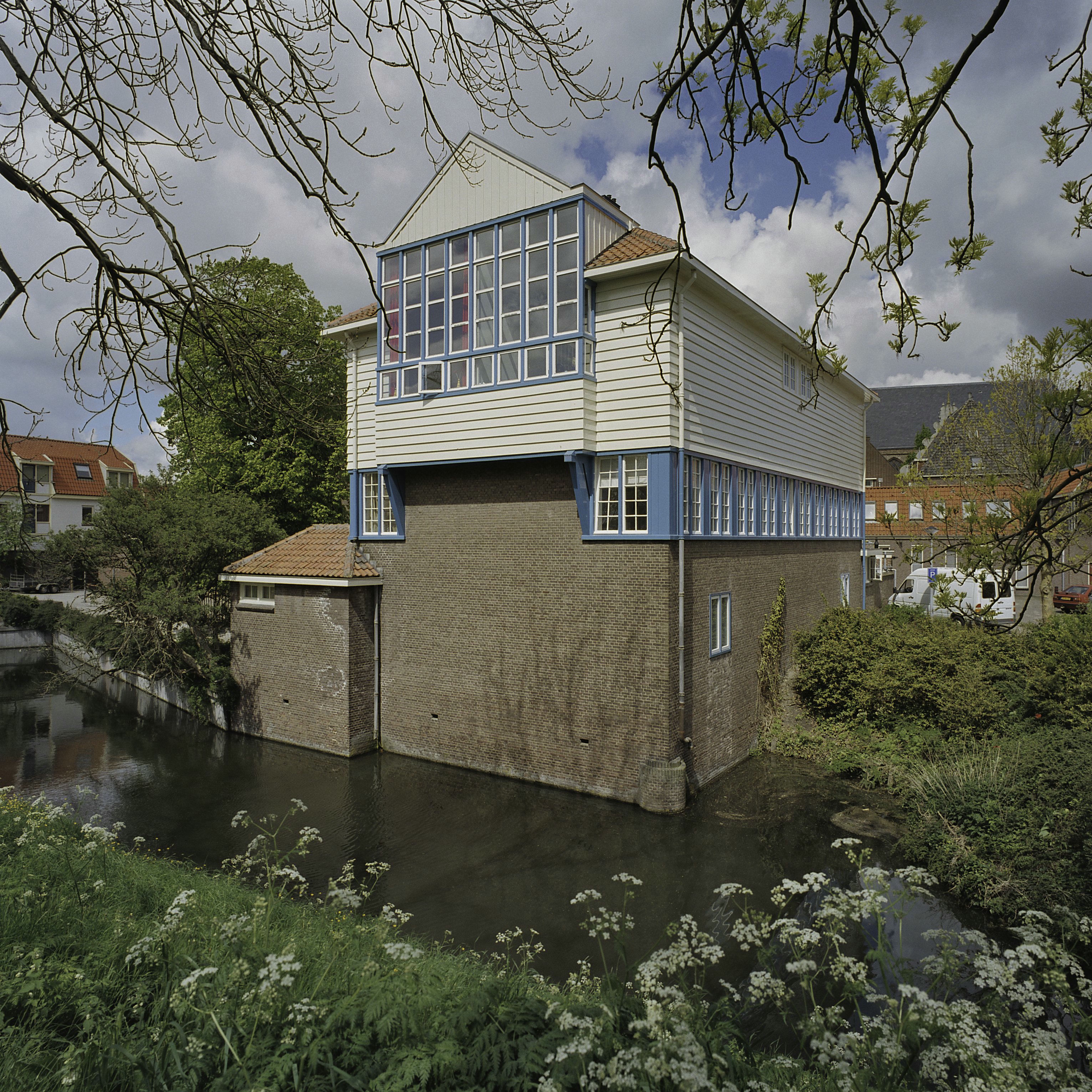 Rijks Hogere Burger School, voormalig: Zicht op achterzijde van gymnastiekzaal met daarboven een tekenzaal (opmerking: Gefotografeerd voor Monumenten In Nederland Noord-Holland)